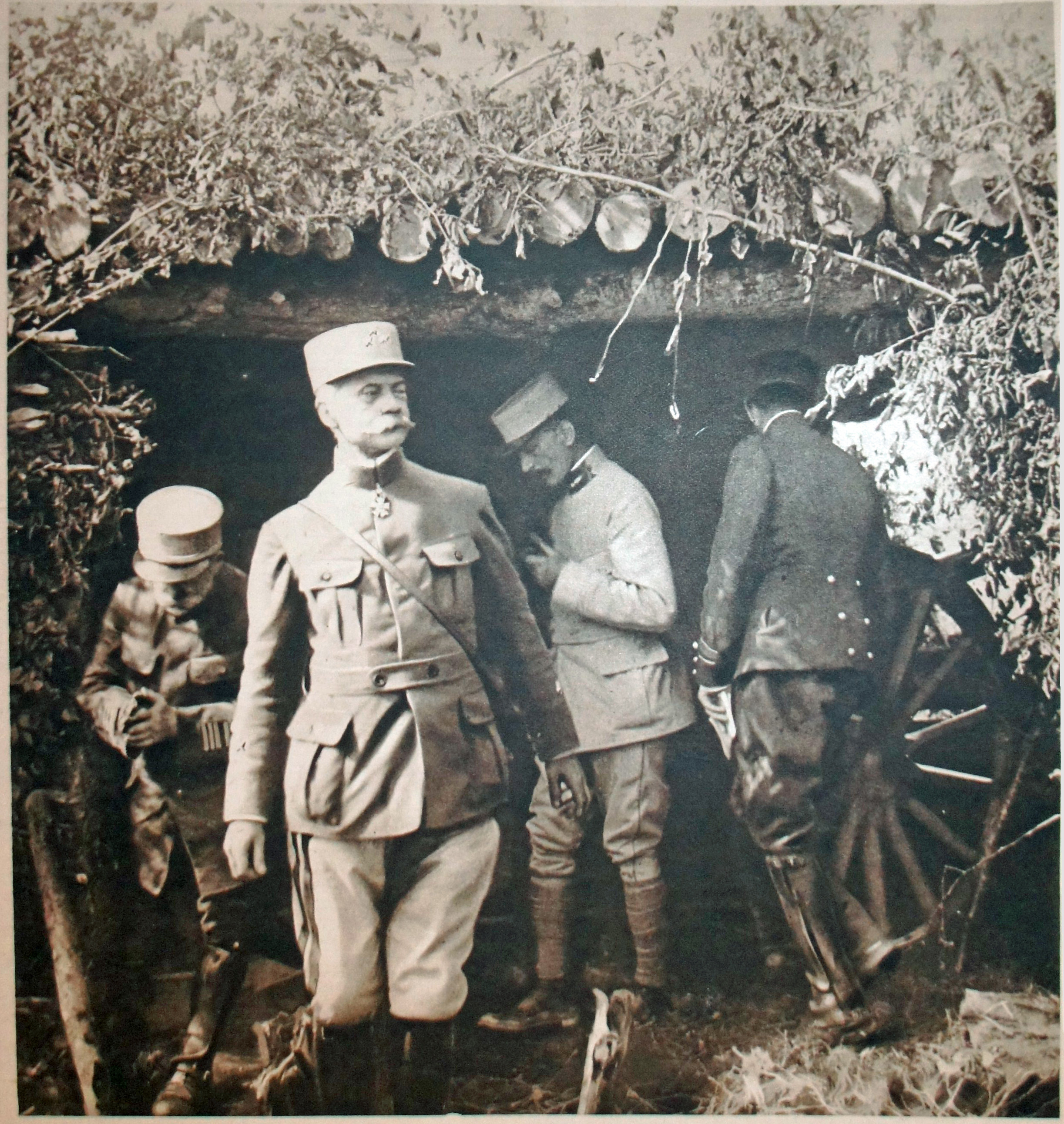 Le Miroir_N°94_en couverture le général Sainte_Claire_Deville, créateur du canon de 75 visitant un abrit de tir sur le frond .